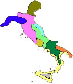 Carte de la péninsule italienne à l'age de fer, inspiré de Image:Iron Age Italy.png.